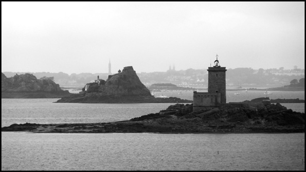 La baie de Morlaix vue depuis la presqu'île de Barnenez. Au second plan, Carentec et l'île Louët. Derrière, Saint-Pol de Léon avec au loin la tour de la chapelle et les flèches de la cathédrale.